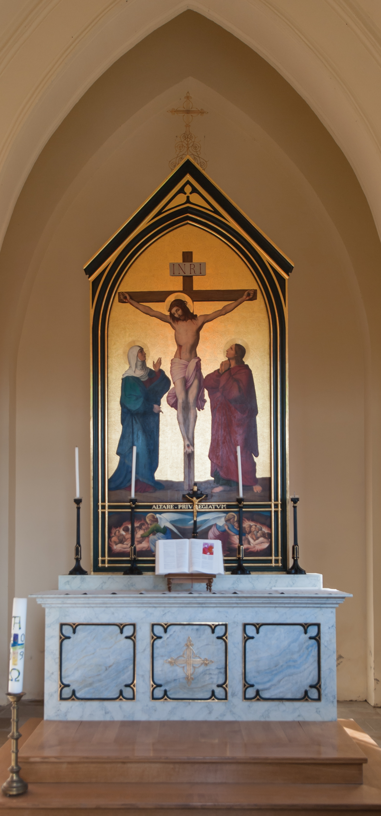 Pinkafeld